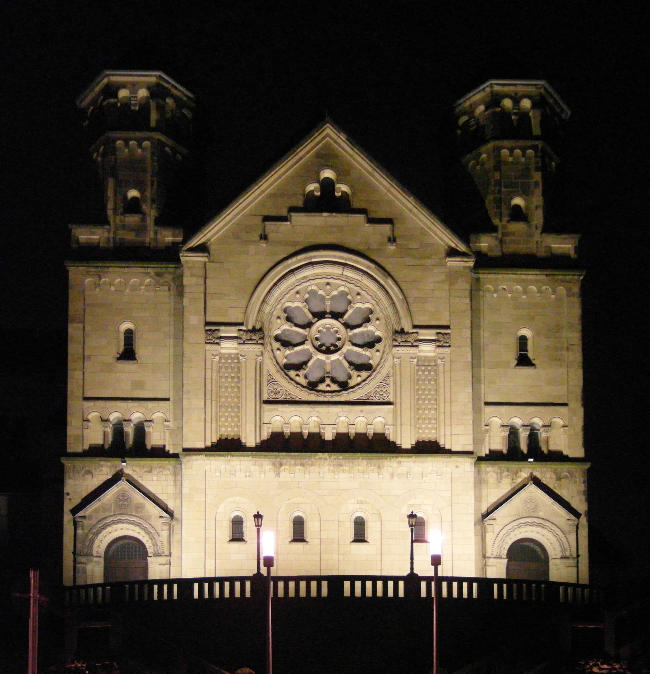 Nordseite der Herz-Jesu-Kirche in Aachen-Burtscheid bei Nacht